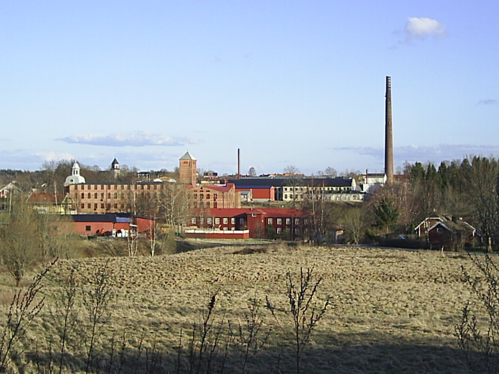 Fabriken i Sjuntorp, Trollhättans kommun. Fotograf: Tubaist. Kyrkan som skymtar ovanför fabriken är Fors kyrka.